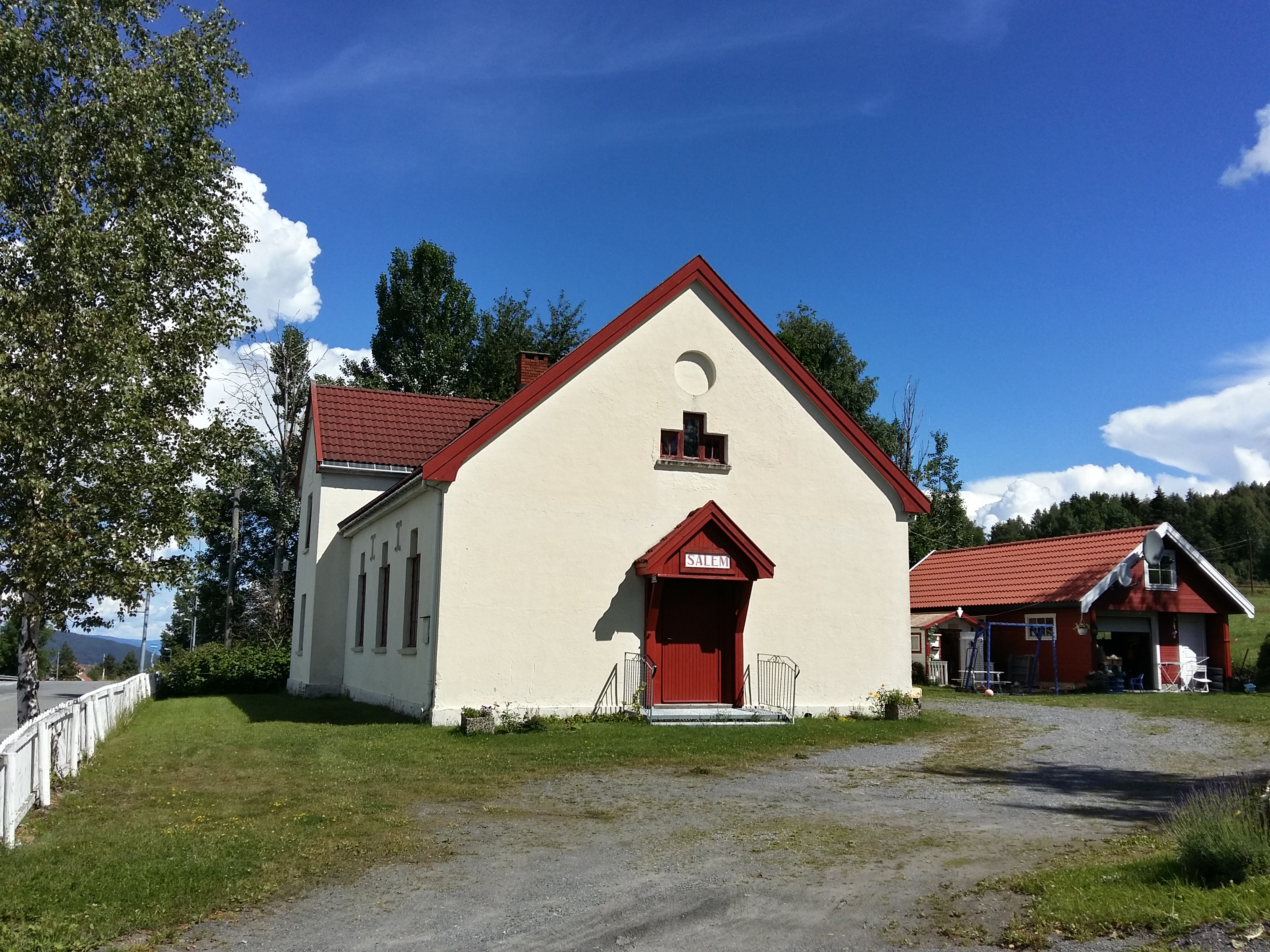 Salemkirken i Åsbygda i Ringerike.